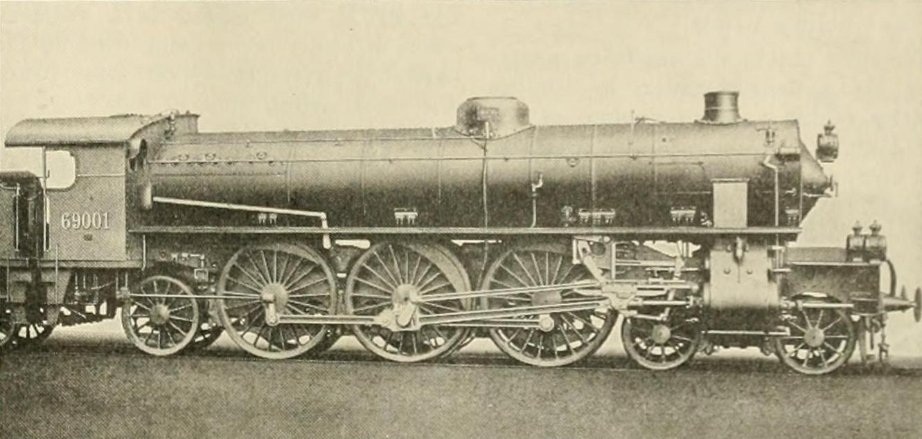 Locomotiva n. 69001 (gruppo 690) delle Ferrovie dello Stato.